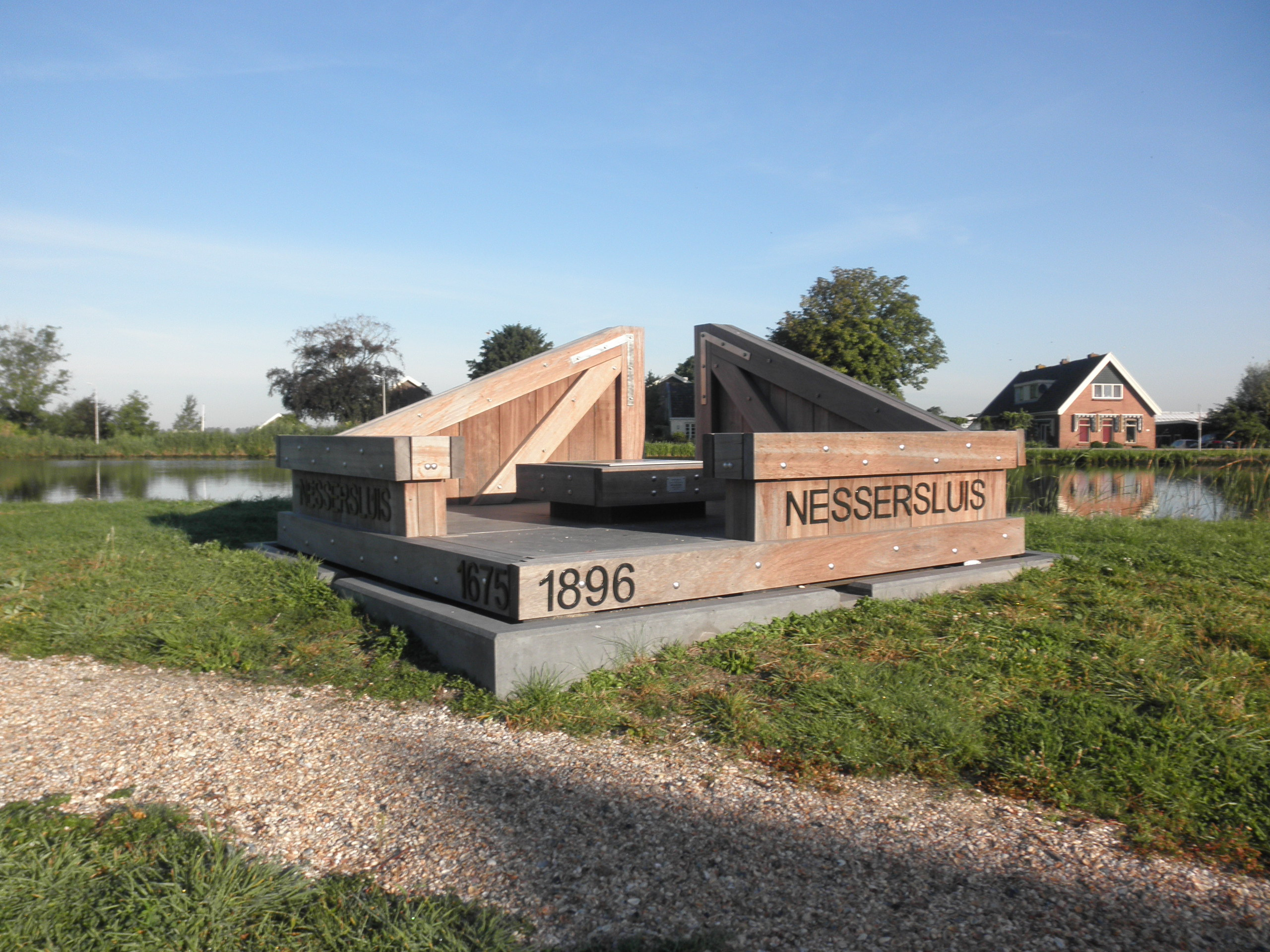 Een klein monument ter nagedachtenis van de oude en niet meer bestaande schutsluis "Nessersluis" die vlakbij de waterweg de Bijleveld verbond met de Amstel. Het monument is opgericht door het Waterschap Amstel, Gooi en Vecht.